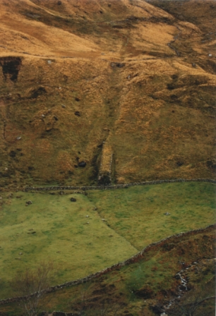 Es el final de la base del resbaladero de Lunada